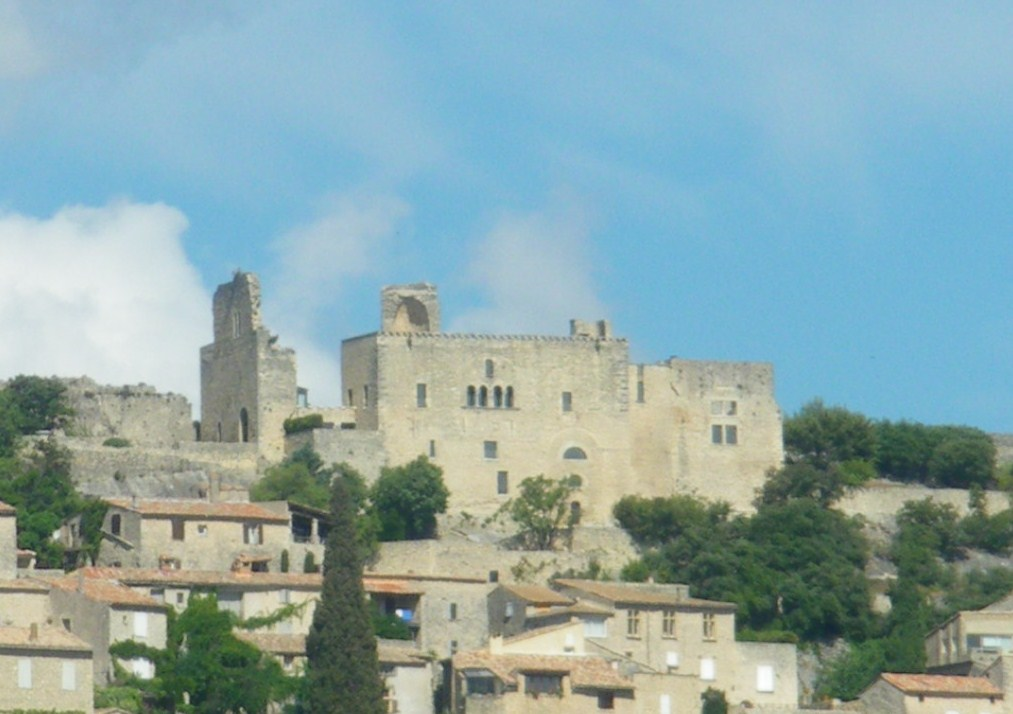 Chateau de Crestet, Vaucluse